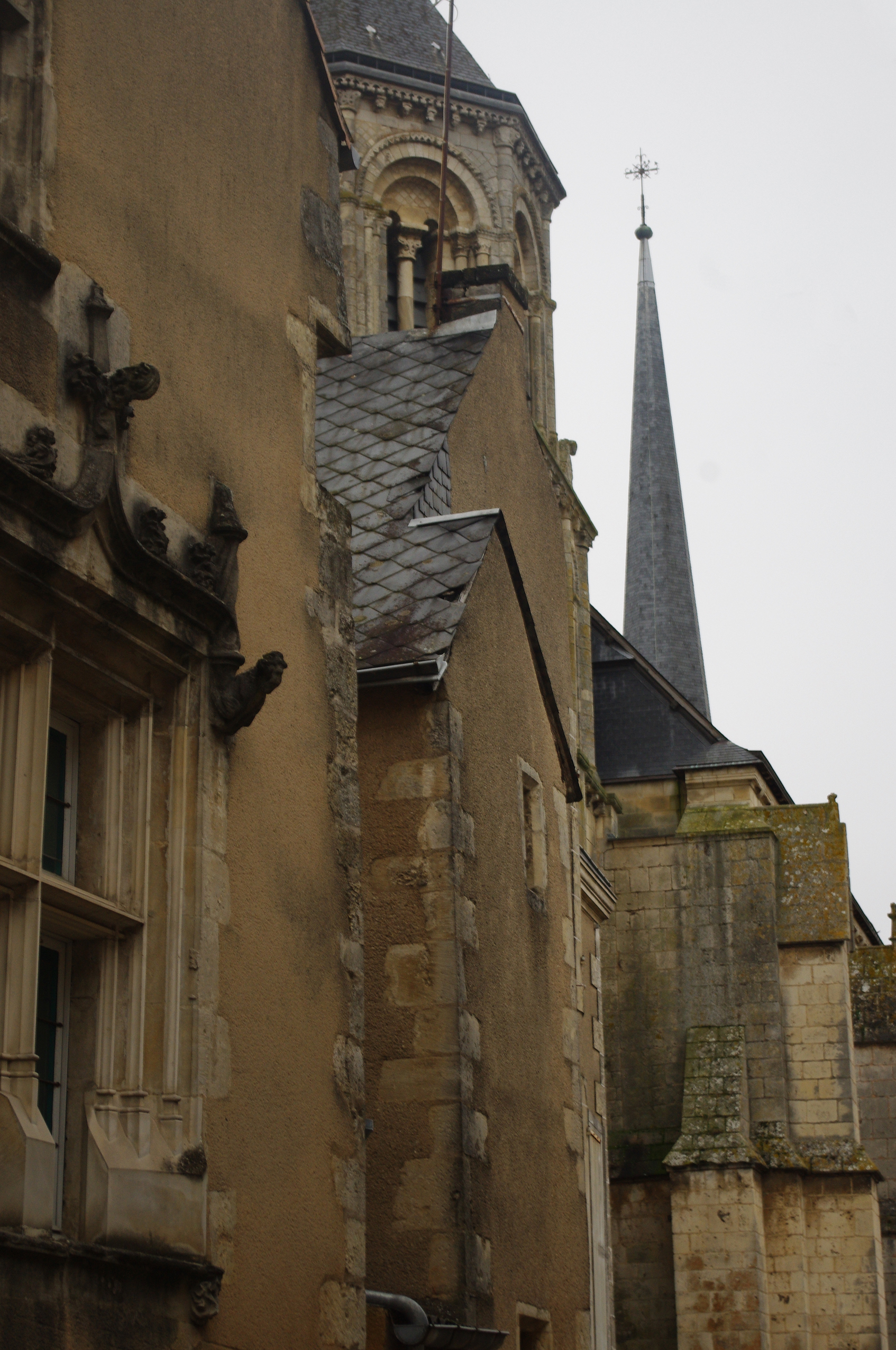 Bâtiments anciens devant l'église Sainte-Radegonde, Poitiers